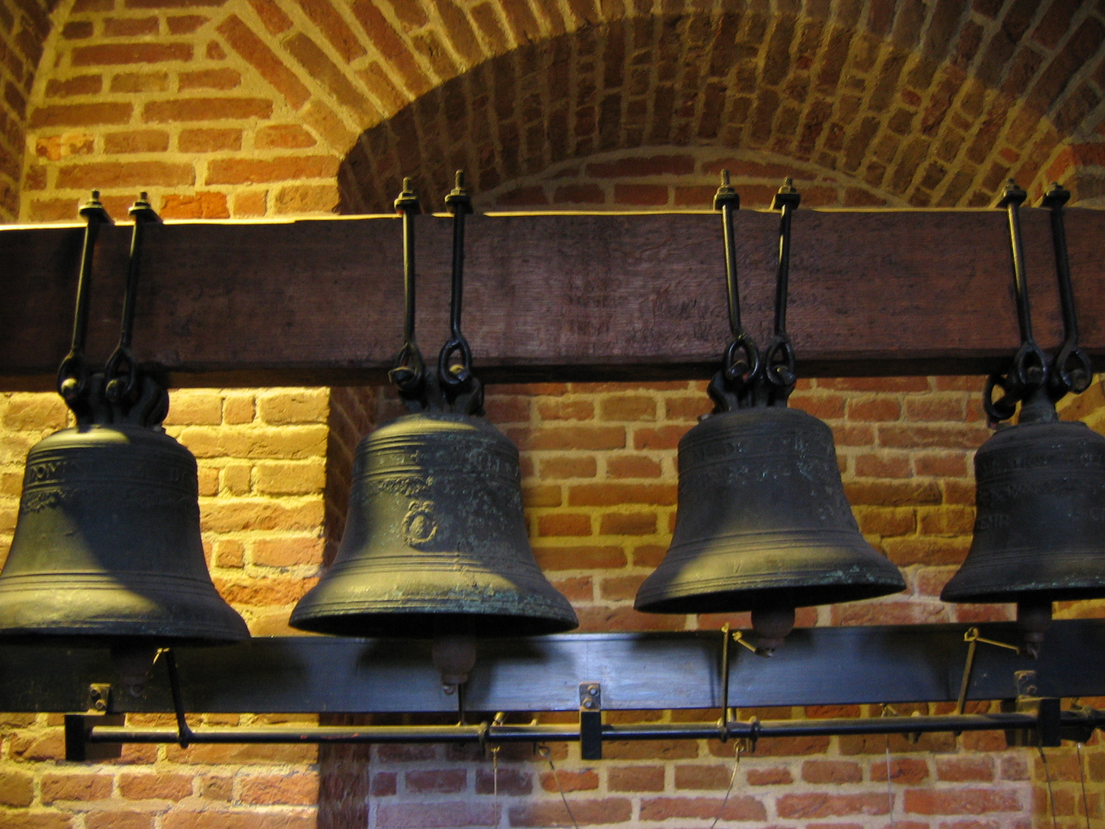 Beklimming van de Westertoren op donderdag 5 augustus 2010. De klokken zijn gemaakt door Pieter en François Hemony